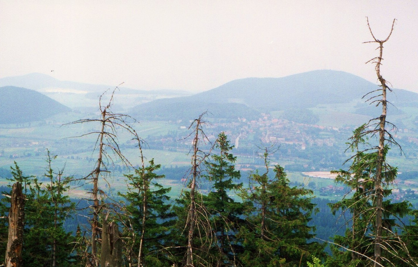 Widok z Dzikowca na Boguszow i Chelmiec, 5.7.1993r.